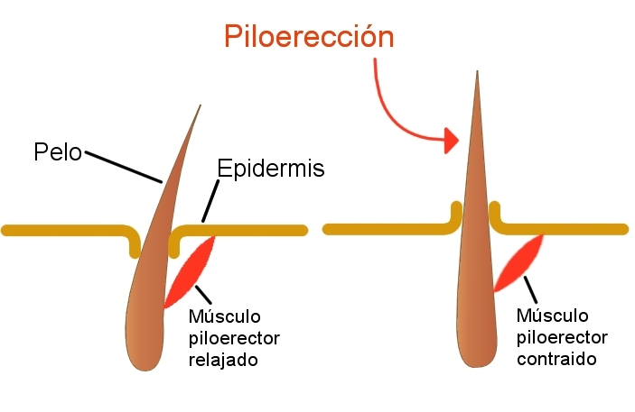 Mecanismo de la piloerección (piel de gallina) por contracción del músculo piloerector.